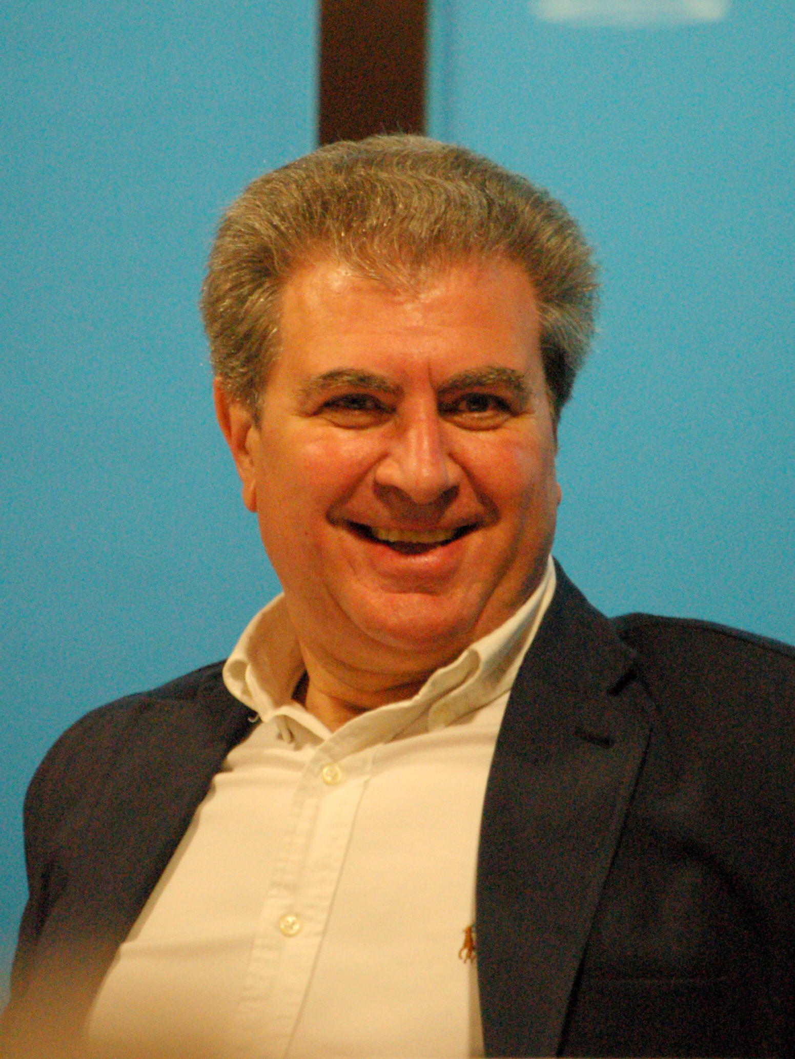 O escritor coruñés César Antonio Molina.